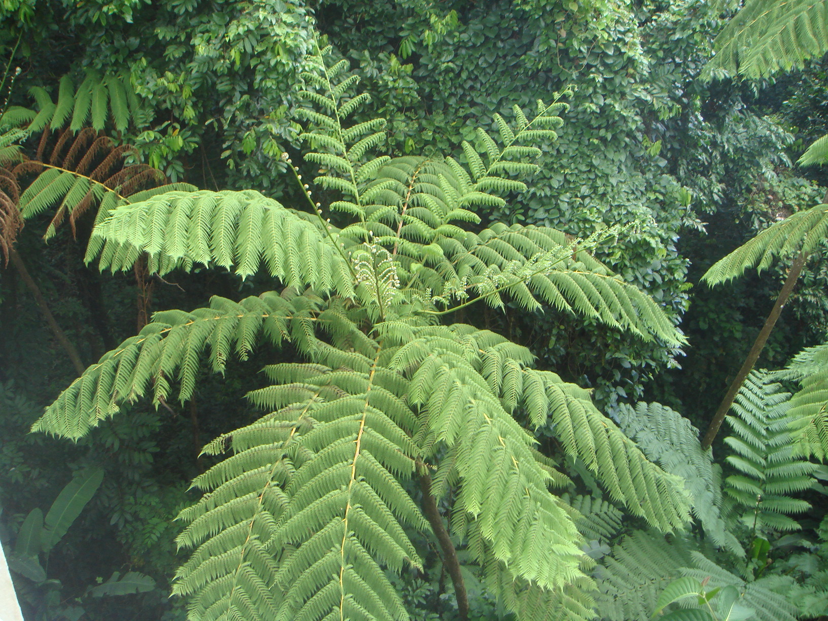 Helecho gigante en el Bosque pluvial el Yunque, Puerto Rico.